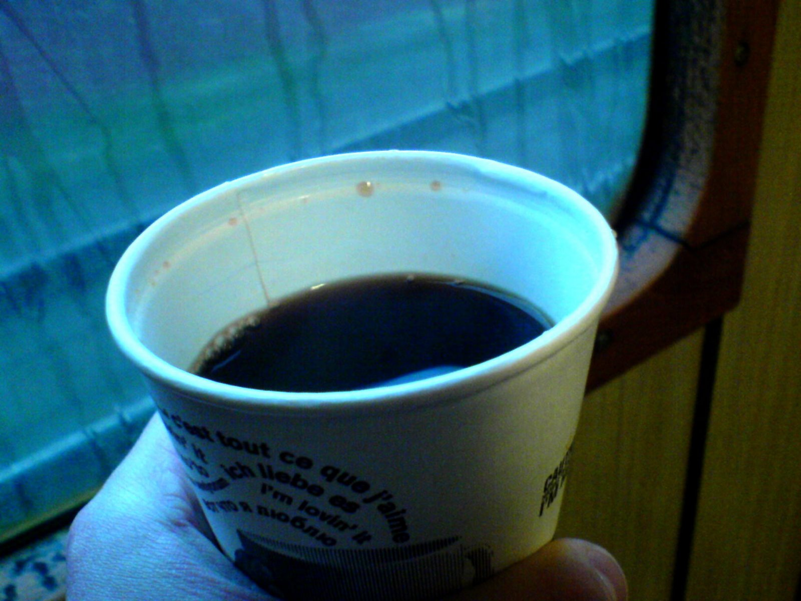 Kaffe